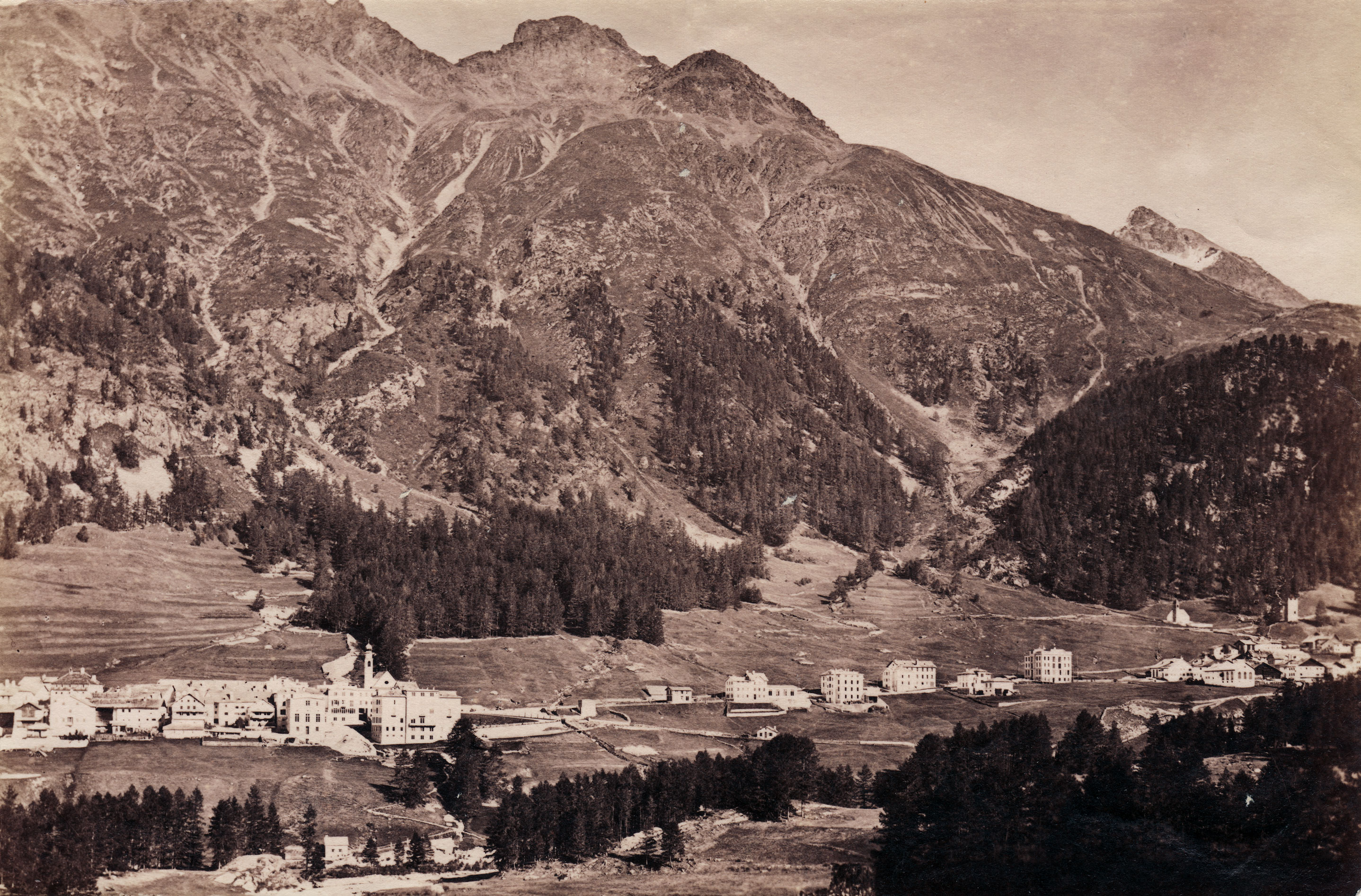 Pontresina, Ansicht um 1880